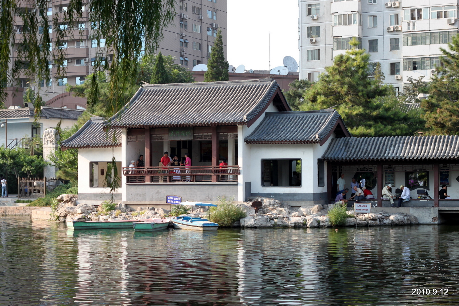 北京团结湖公园